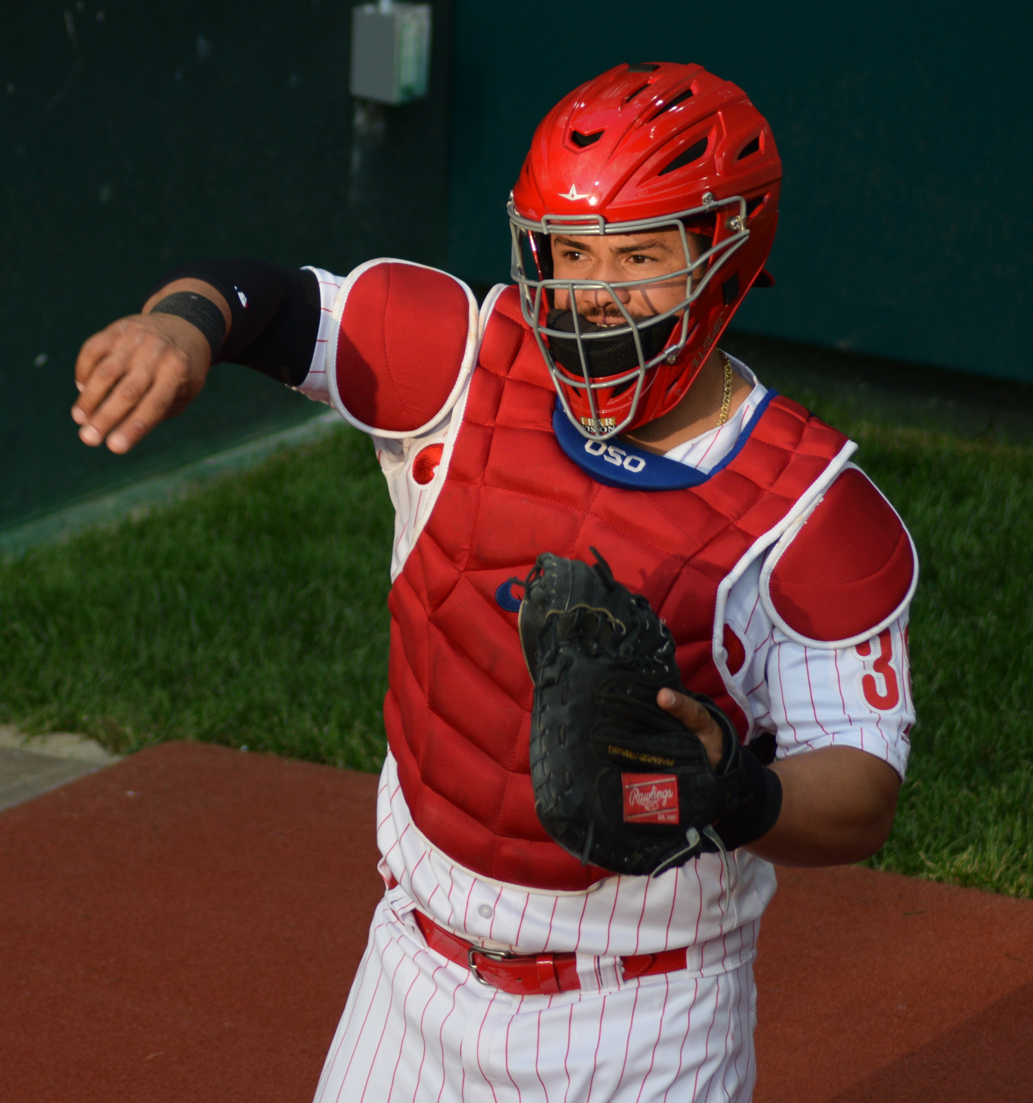 Jorge Alfaro